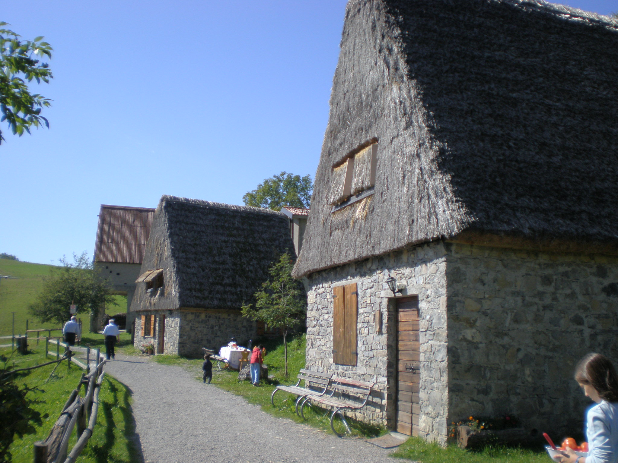 me stesso 2007 Fienili a Cima Rest di Magasa pubblico dominio